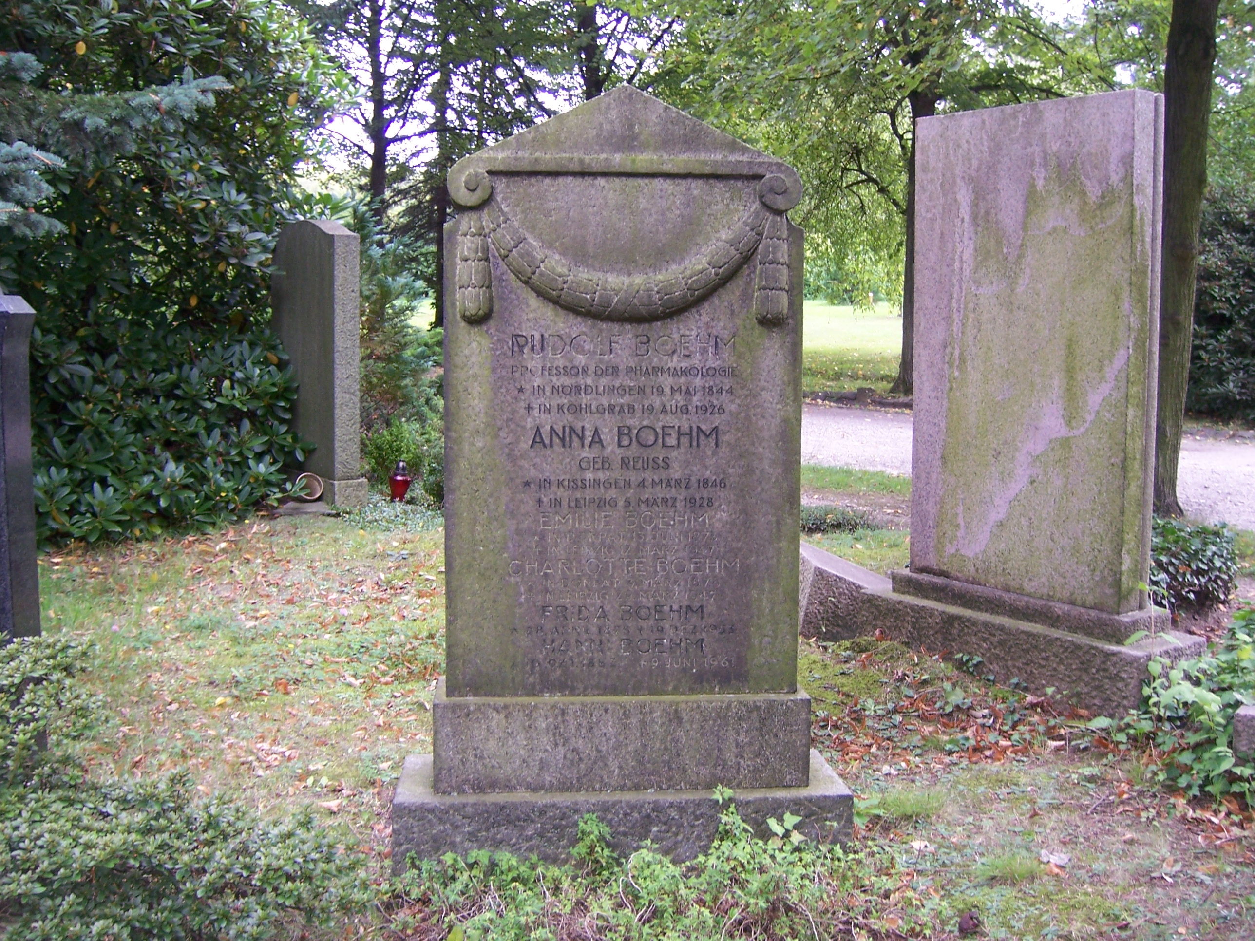 Grabstätte Rudolf Böhm und Angehörige auf dem Südfriedhof Leipzig